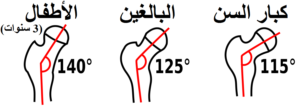 زاوية الميل عنق عظم الفخذ Femur neck (femoral neck or neck of the femur) Angle of inclination